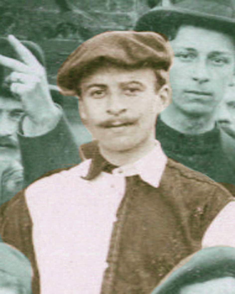 Bildnis Steinberg , Ausschnitt aus einem Mannschaftsbild des MBC 18.06.1899